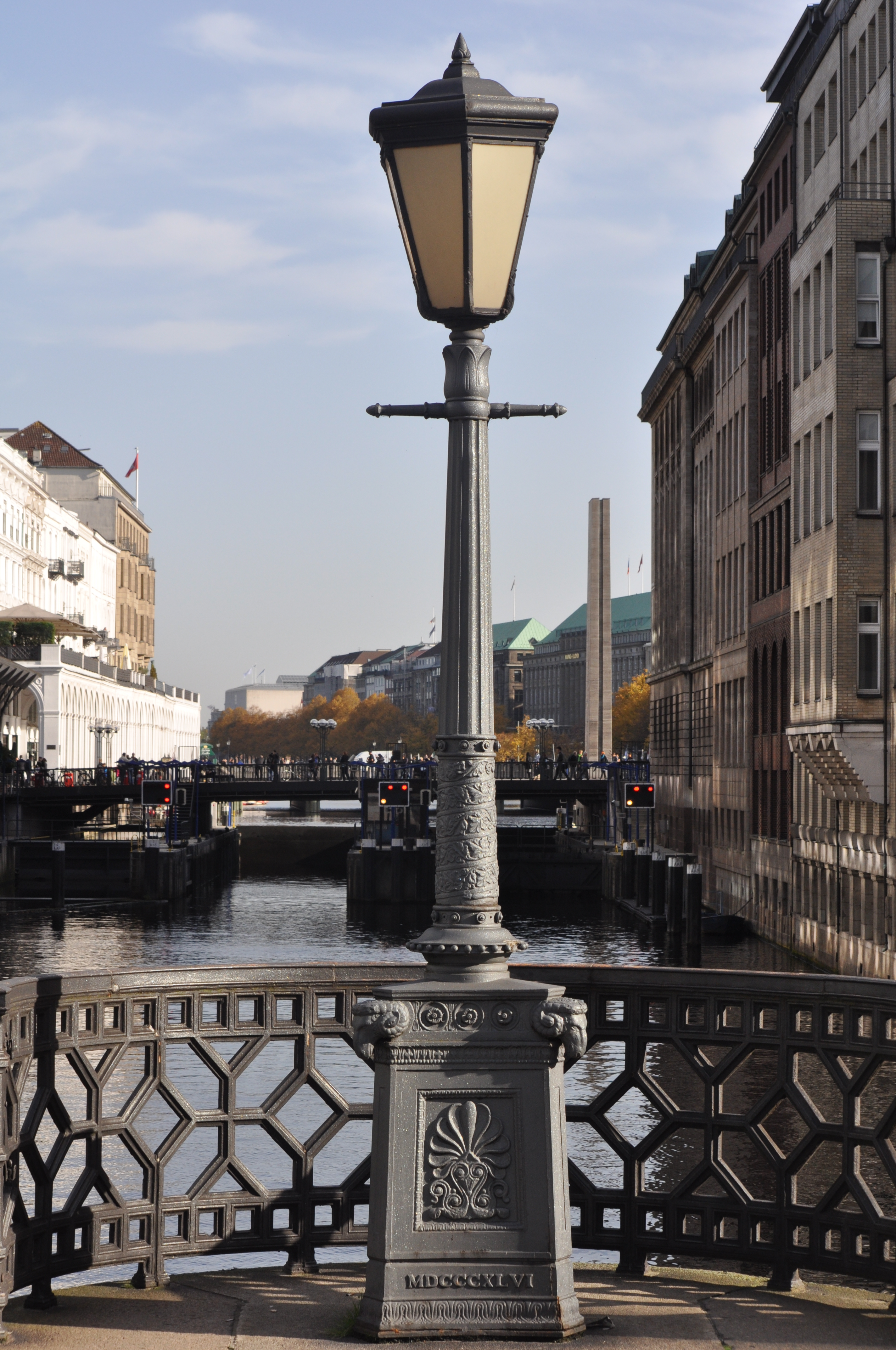 Kandelaber auf der Adolphsbrücke in Hamburg, 1846 von Johann Hermann Maack This is a photograph of an architectural monument.